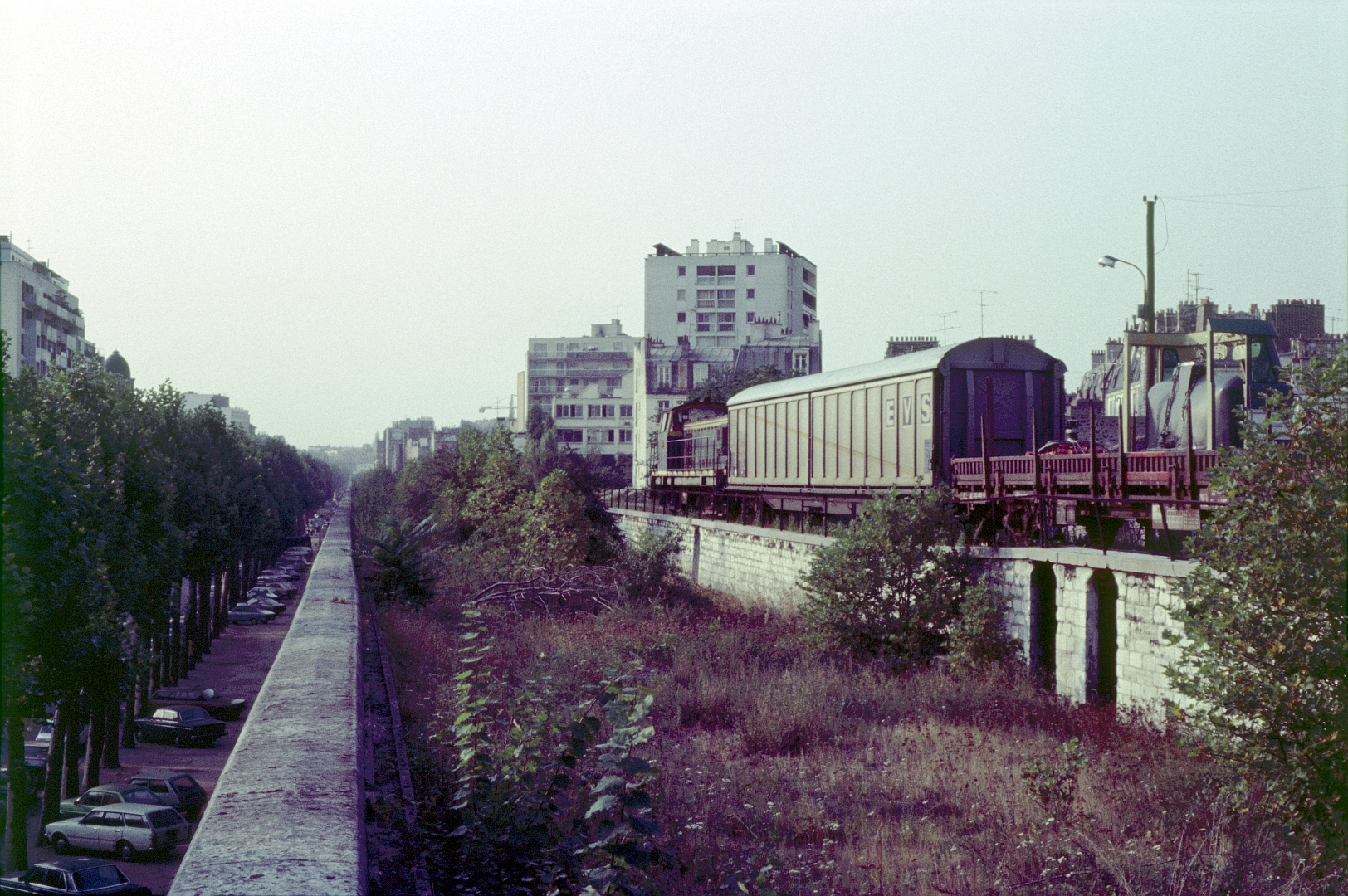 L'ancienne plateforme de la ligne de la Bastille sur le viaduc de l'avenue Daumesnil ; avec à droite un train sur le tiroir de manœuvre de la gare de Reuilly le 25 septembre 1985.